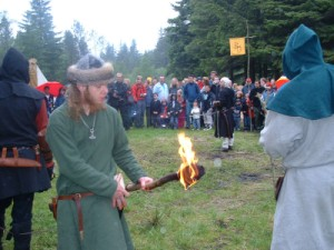 Fra Bjørgvin Marknad i 2005